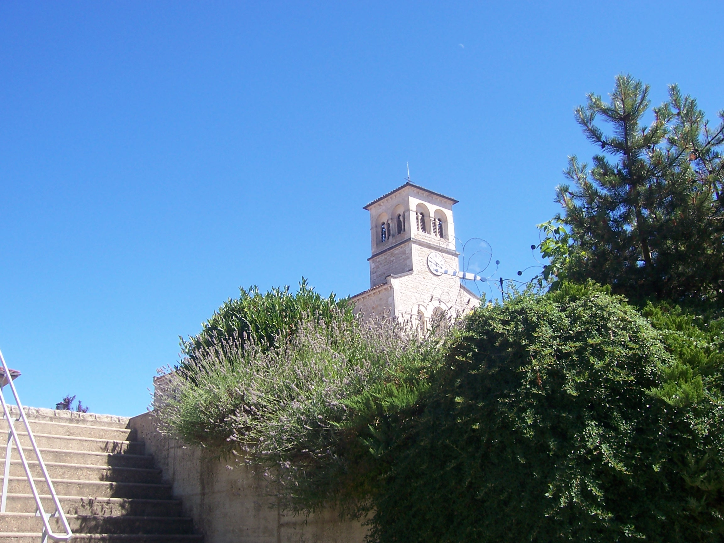 Eglise de Dommartin-lès-Cuiseaux